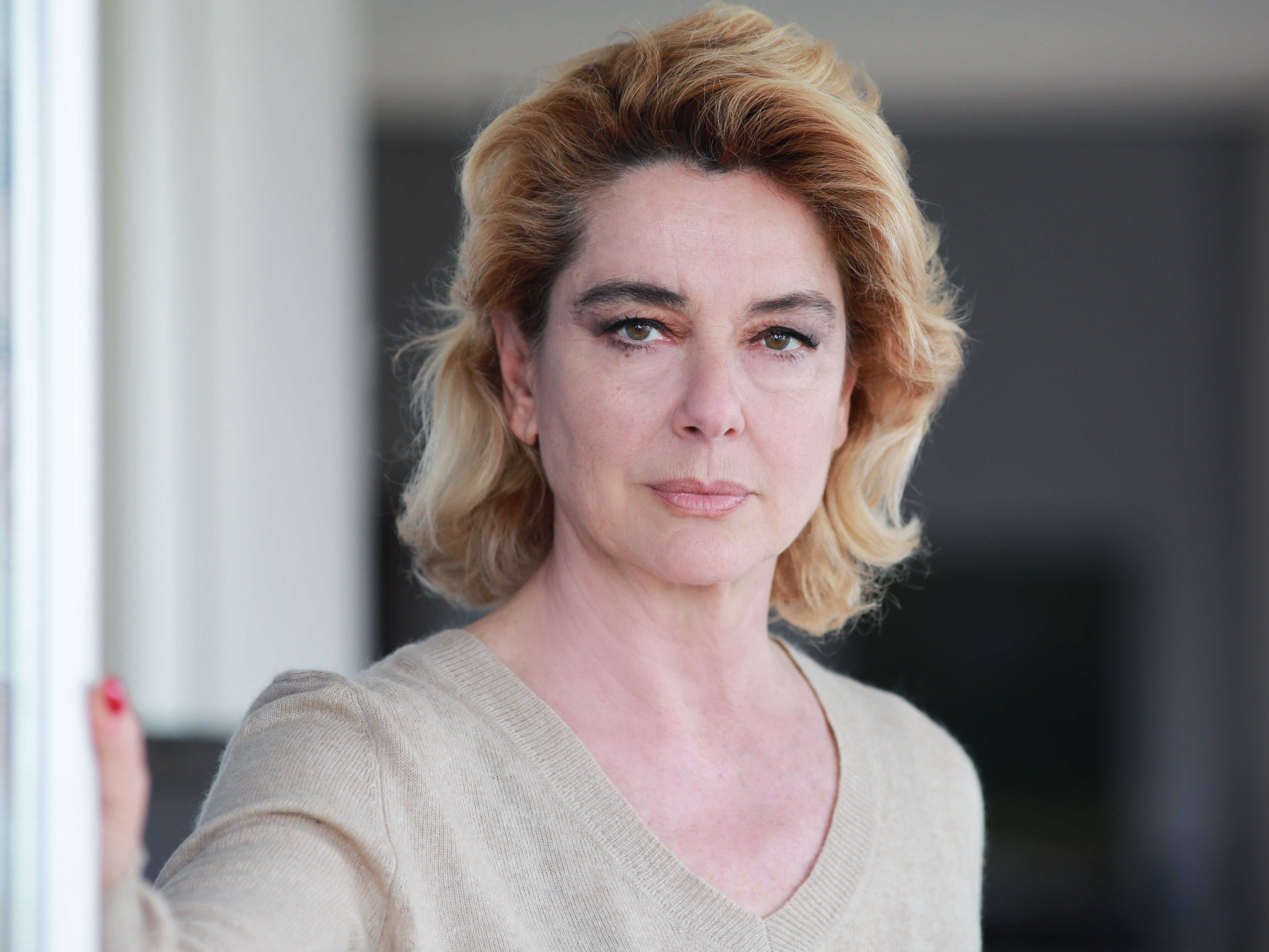 Marzo 2017 -Roma